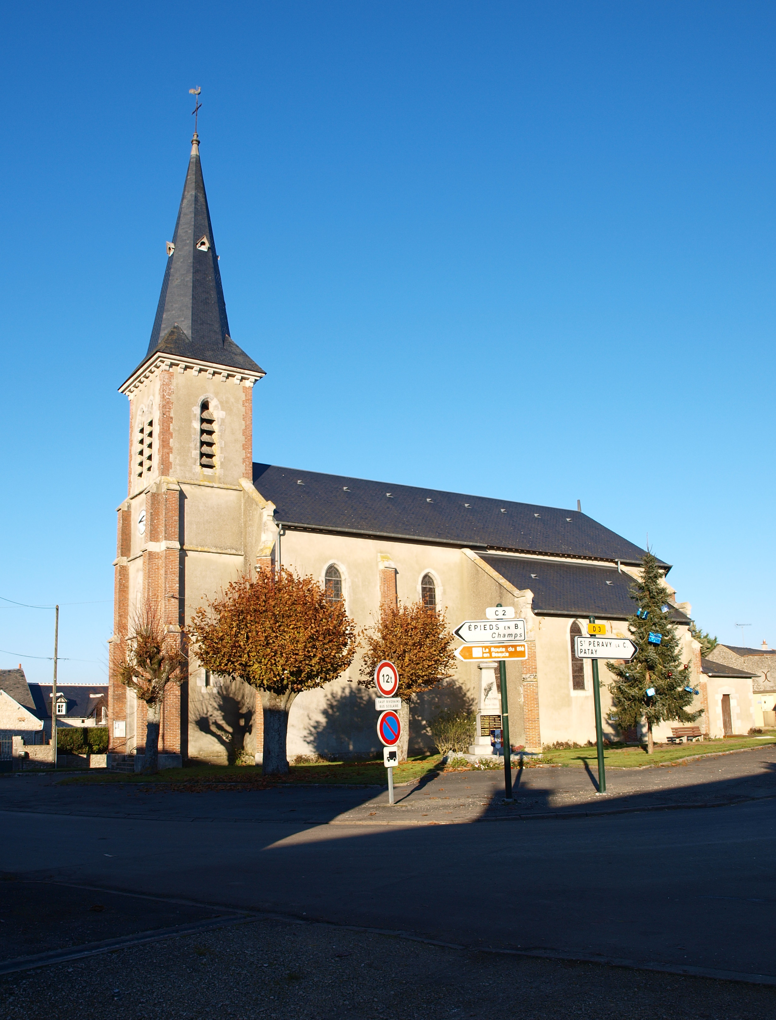 Saint-Sigismond (Loiret, France) ; église